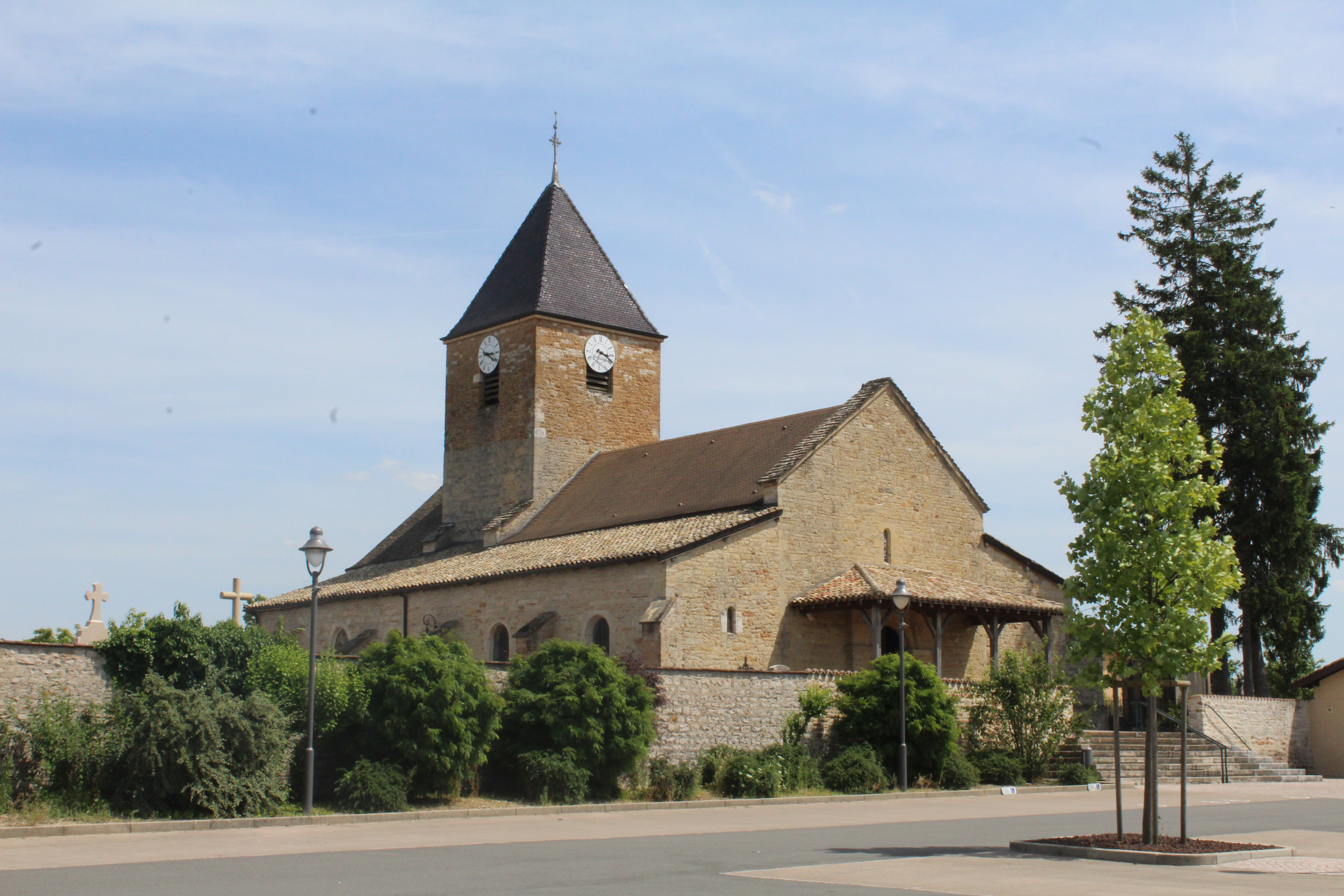 Église romane de Replonges.